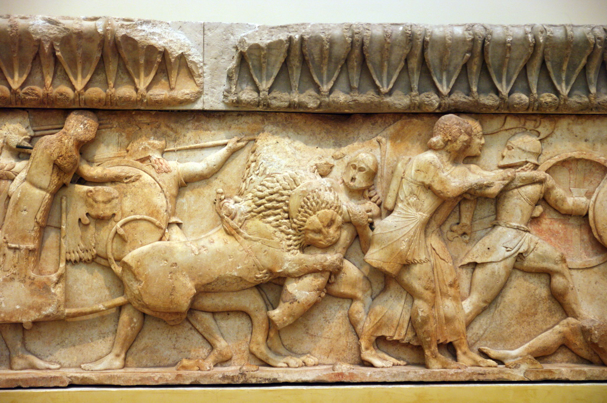 Museum Delphi, Tempelfries